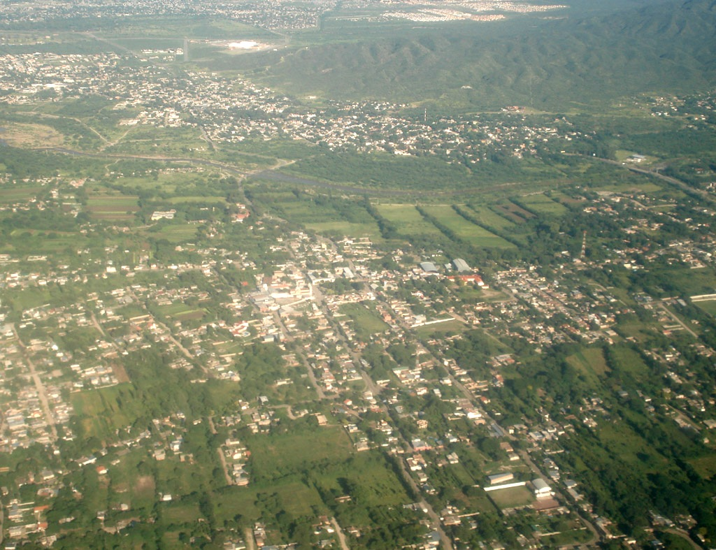 Vista aérea de la localidad de San Isidro, Departamento Valle Viejo, Catamarca.